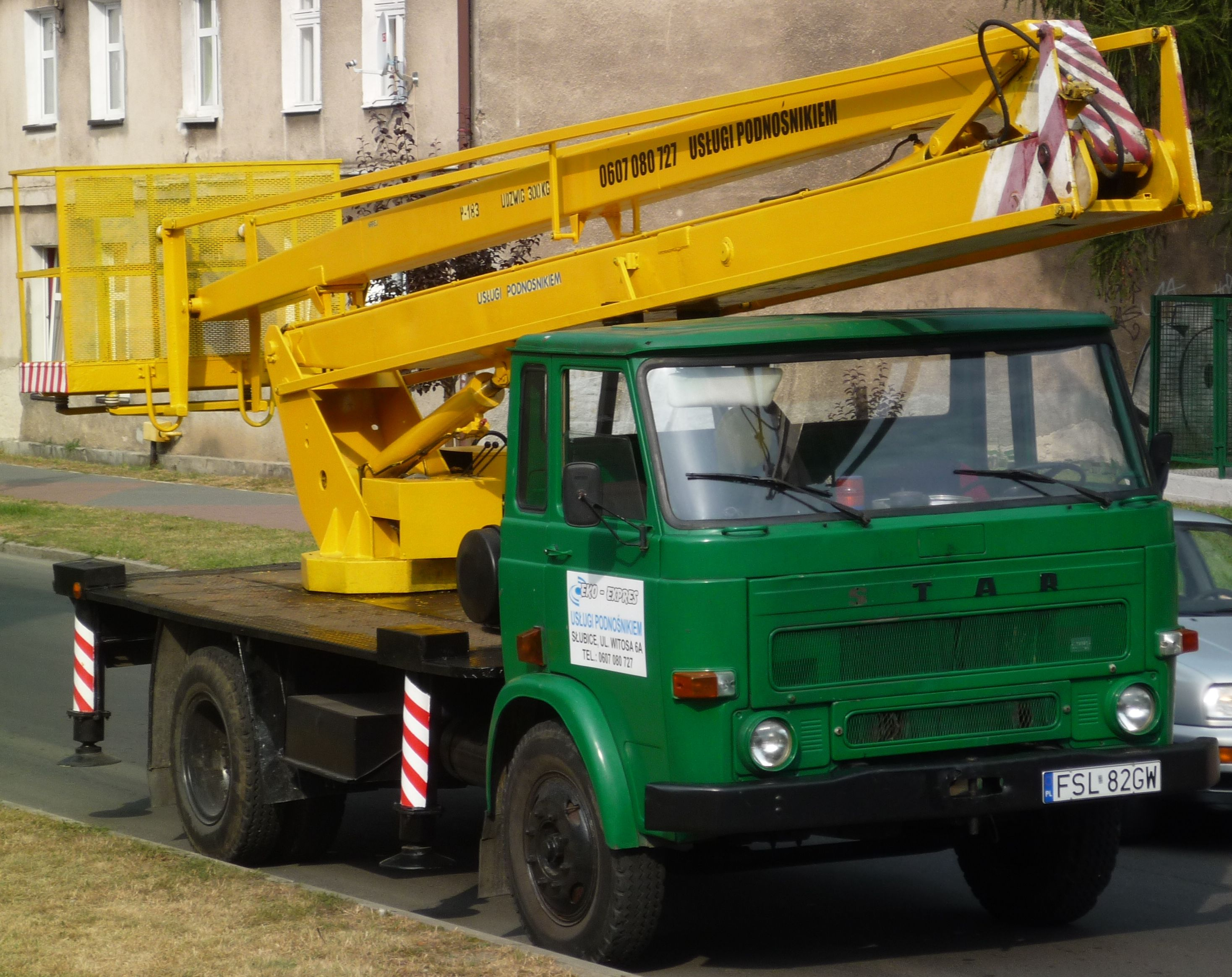 Star 28/29 (podnośnik koszowy) w Słubicach.